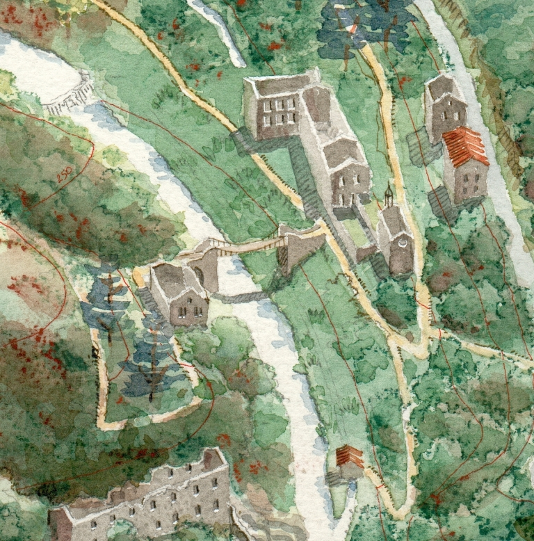 Pont de Moulin sur Cance dessin